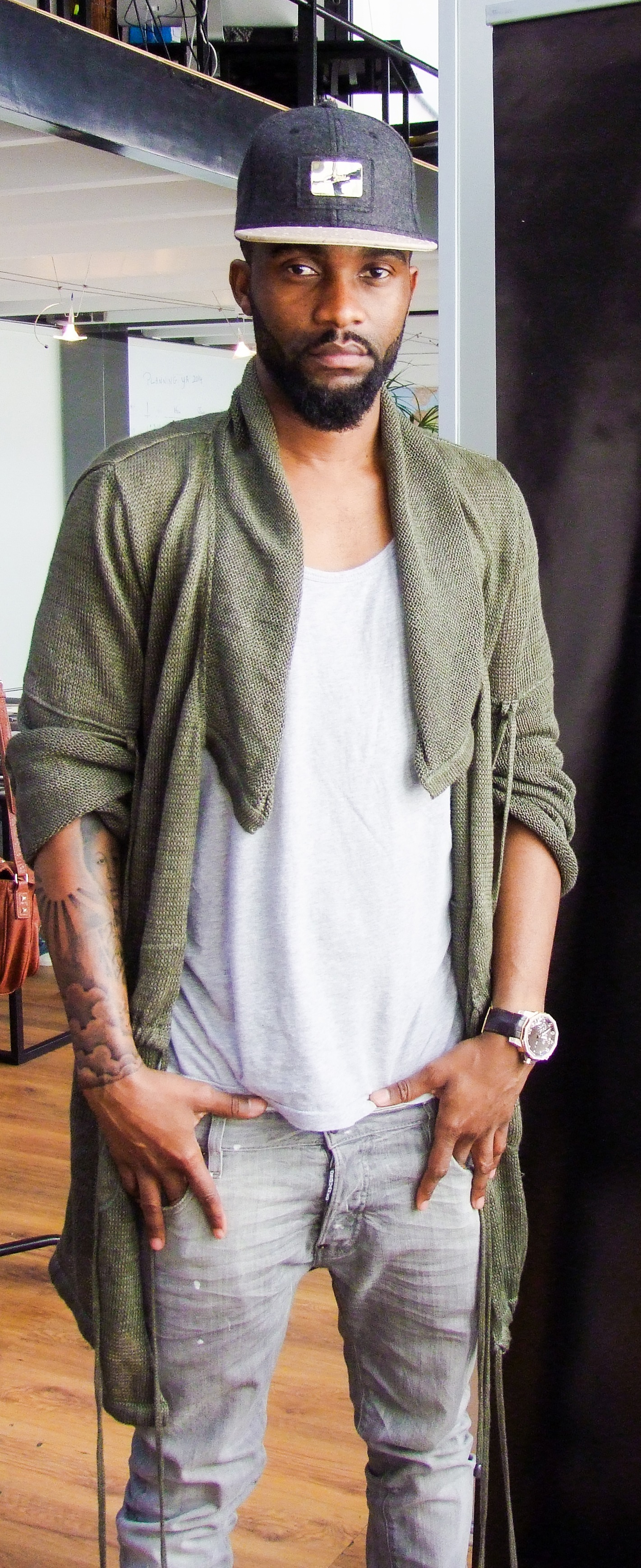 Fally Ipupa quand je l'ai vu à Do Agric en 2014.